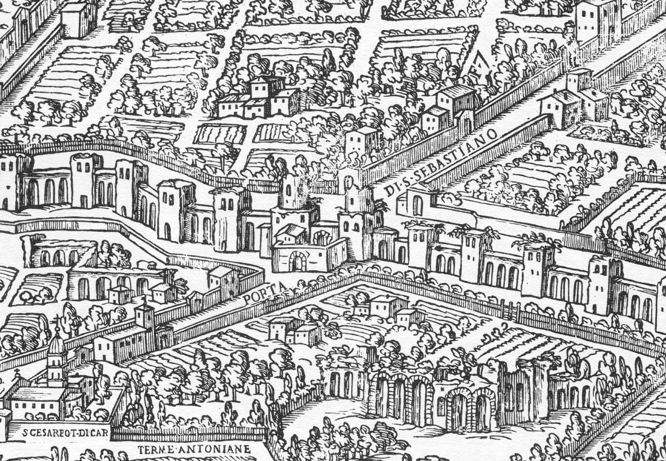 Porta Appia op een kaart van Maggi uit 1625.